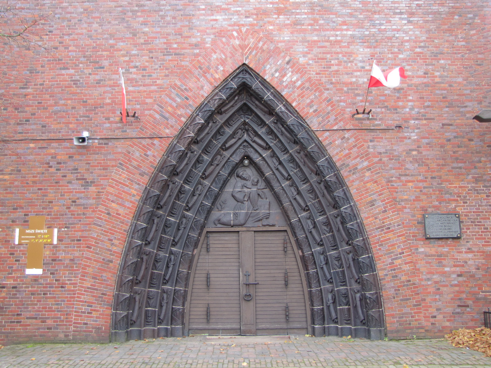 Sławno, ul. Kościelna 12 - portal rzymskokatolickiego kościoła parafialnego pw. św. Antoniego z Padwy, autor: Fritz Theilmann